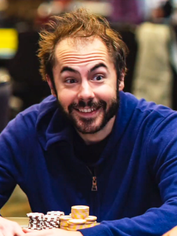 Elio Fox beim WPT Gardens Poker Festival